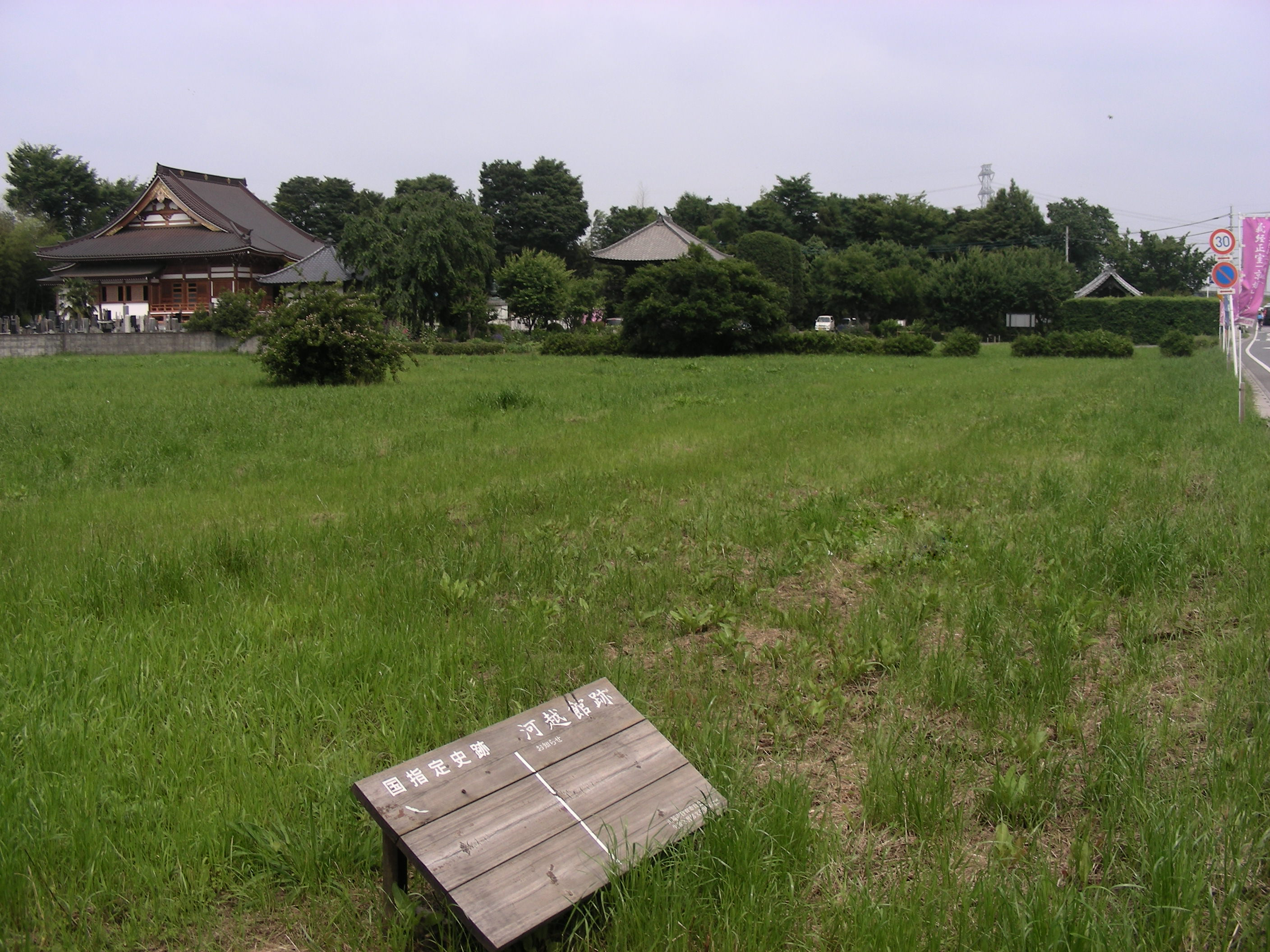 埼玉県川越市上戸の河越館跡。2008年6月撮影